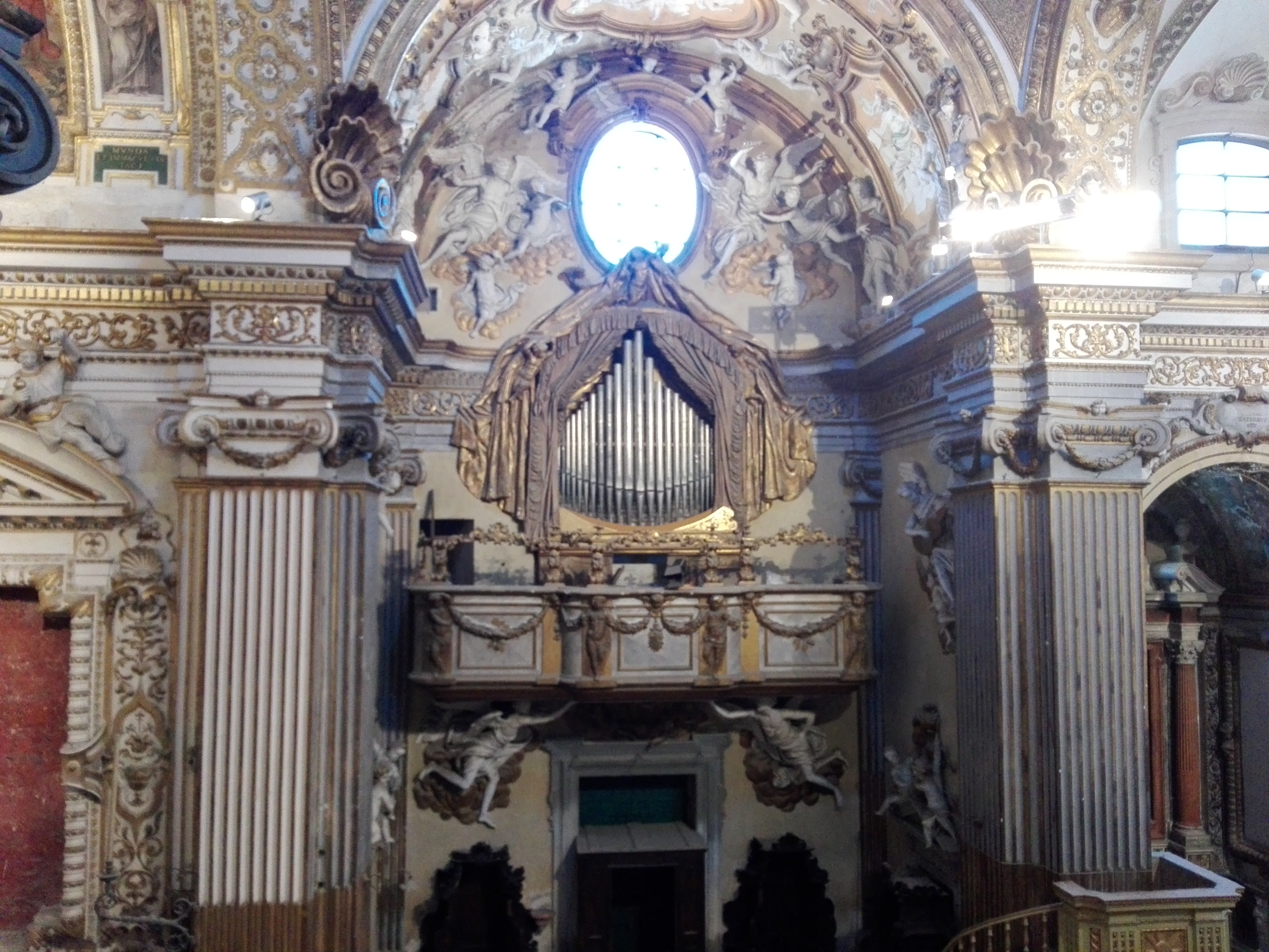 Chiesa